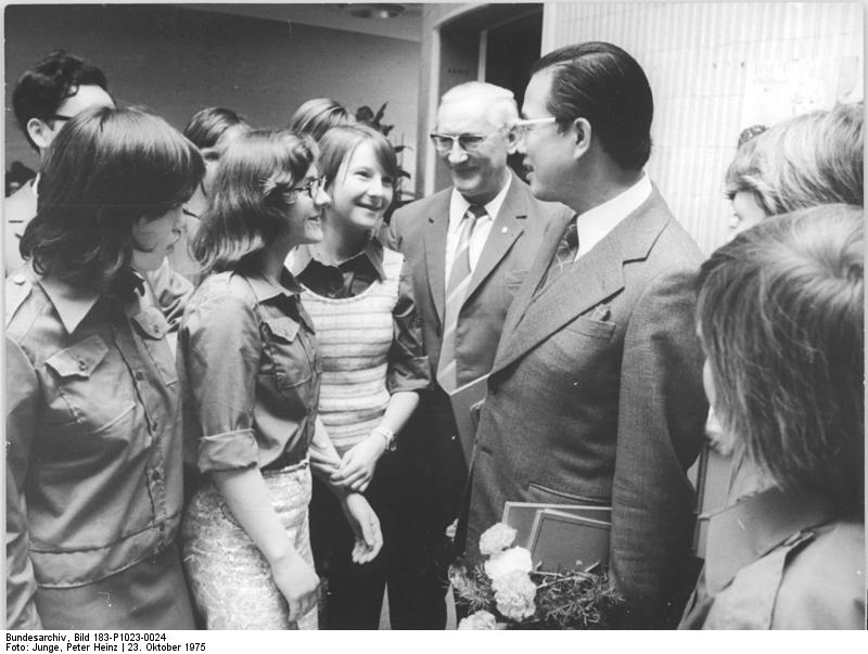 Berlin, Jugendstunde, Vertreter Vietnams ADN-ZB Junge 23.10.1975 Berlin: Auf einer Solidaritätsveranstaltung im Berliner Filmtheater "Kosmos" mit Vertretern der DRV- und RSV-Botschaft bekundeten am 23.10.1975 900 Jugendweiheteilnehmer des Kreises Bad Doberan ihre feste Freundschaft und Solidarität mit dem vietnamesichen Volk. Sie übergaben Max Sefrin (Mitte, l.), Vorsitzender des Vietnam-Ausschusses des DDR-Solidaritätskomitees, Solidaritätsspenden in Höhe von über 30.000 Mark. Zugegen war auch der Botschaftsrat der DRV, Le Trung Hghis (Mitte, r.), hier im herzlichen Gespräch mit den Jugendlichen. (vergl. dazu ADN-Meld. vom 23.10.1975)